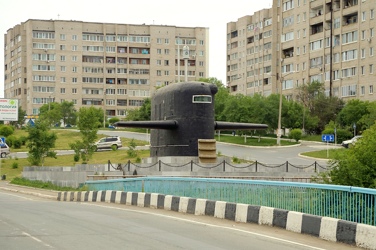 Рубка АПЛ К-434 Большой Камень 2015.06.27